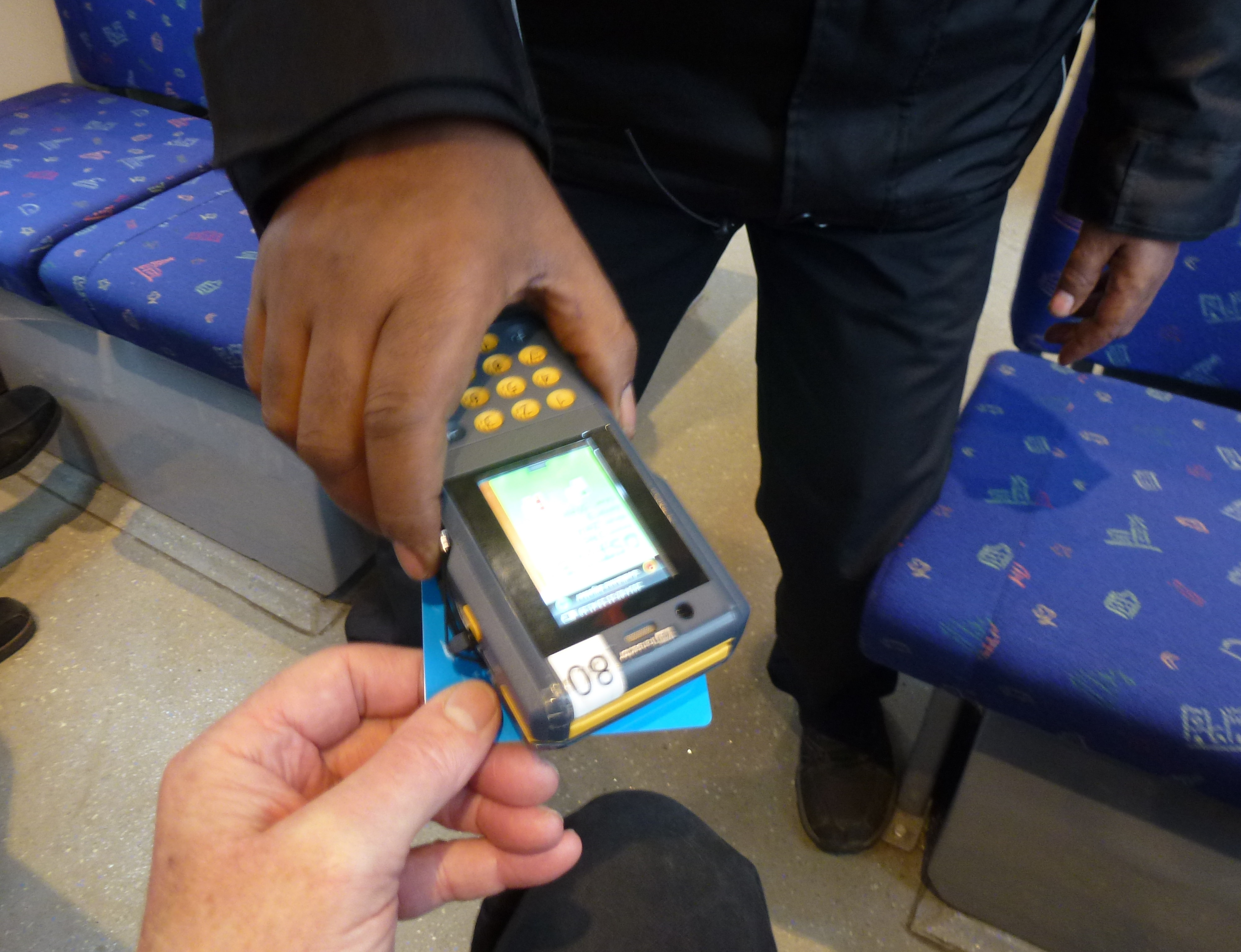 Läsning av ett Accesskort på Roslagsbanan